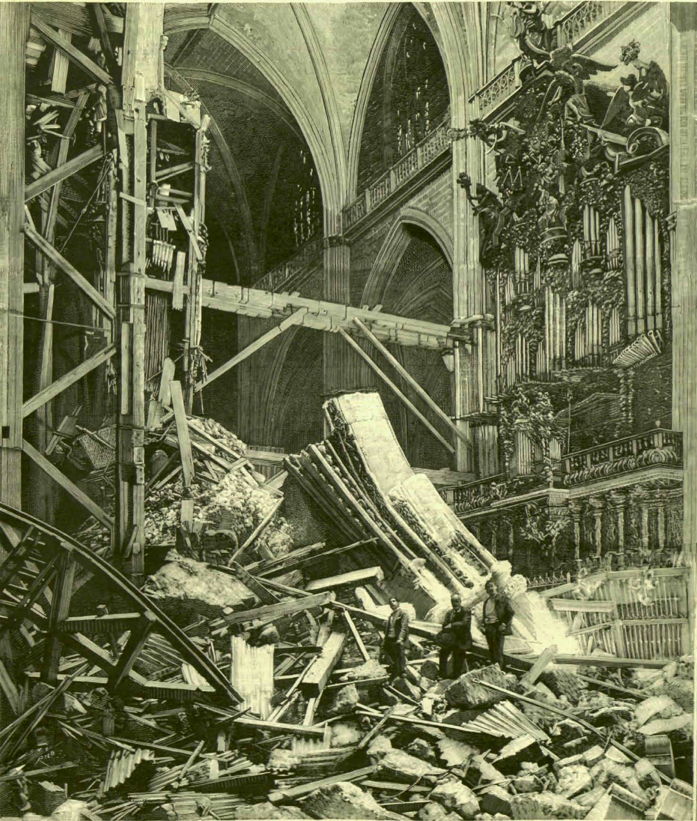 Hundimiento de la catedral de Sevilla, en 1888.